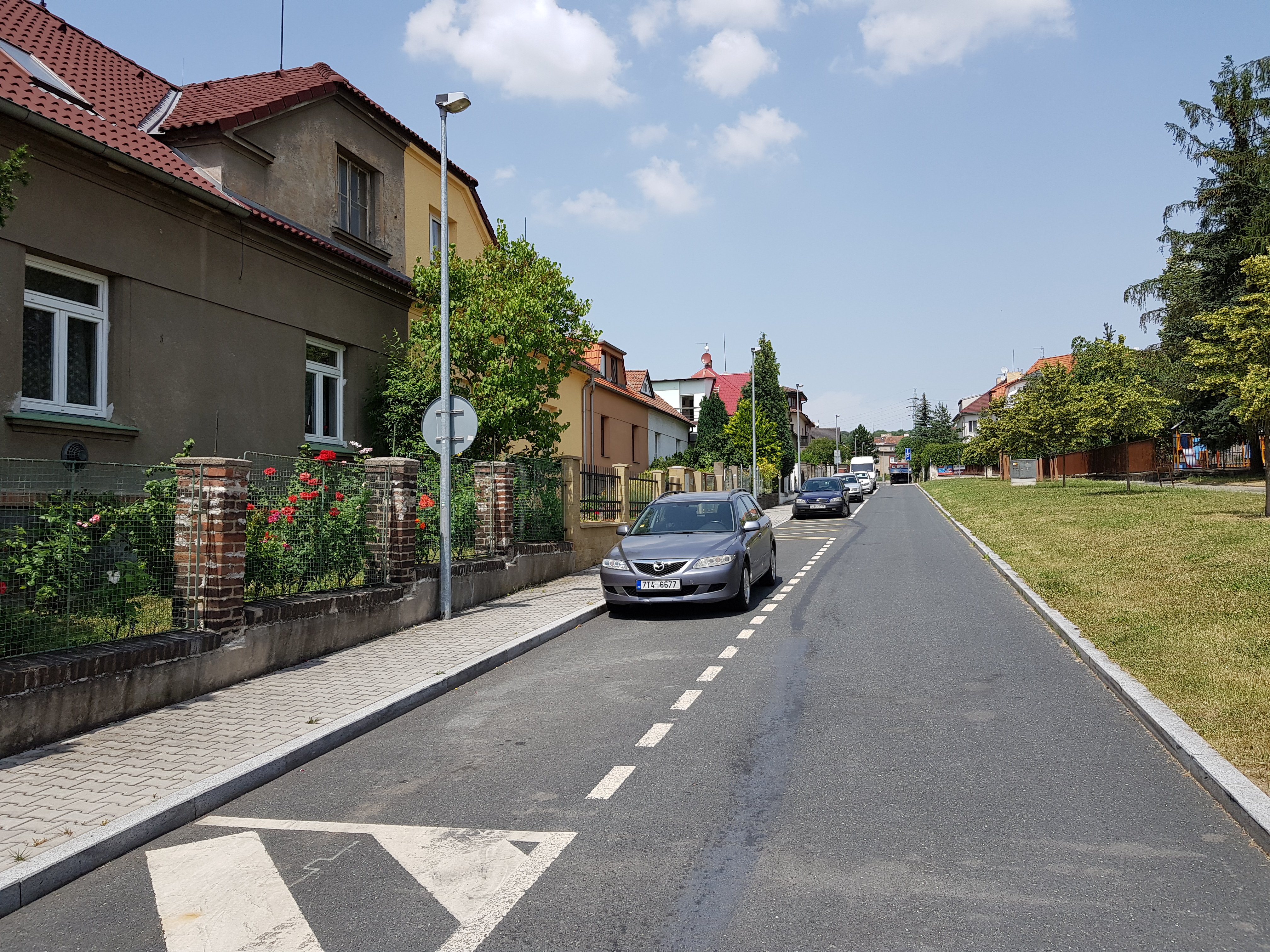 Ulice V Novém Hloubětíně, Praha 14-Hloubětín